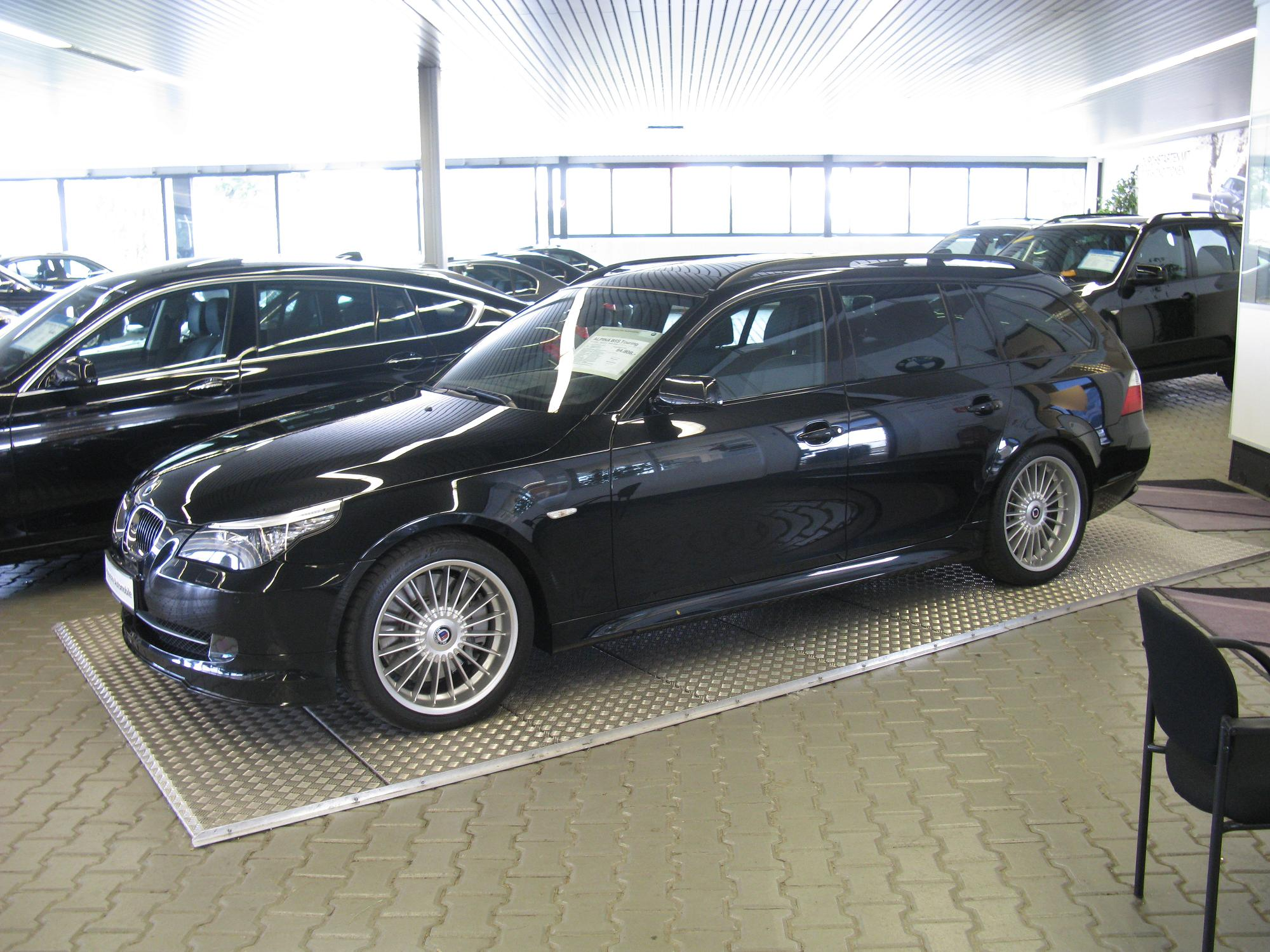 BMW Niederlassung Hamburg